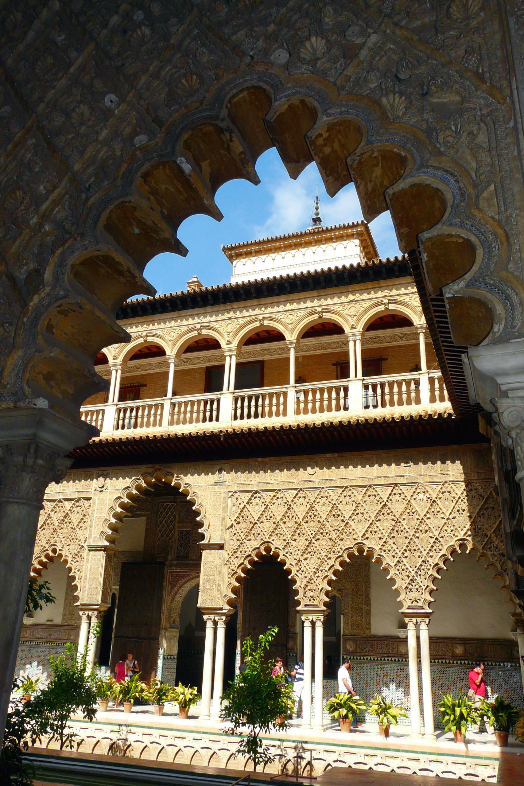 palais royal de Séville